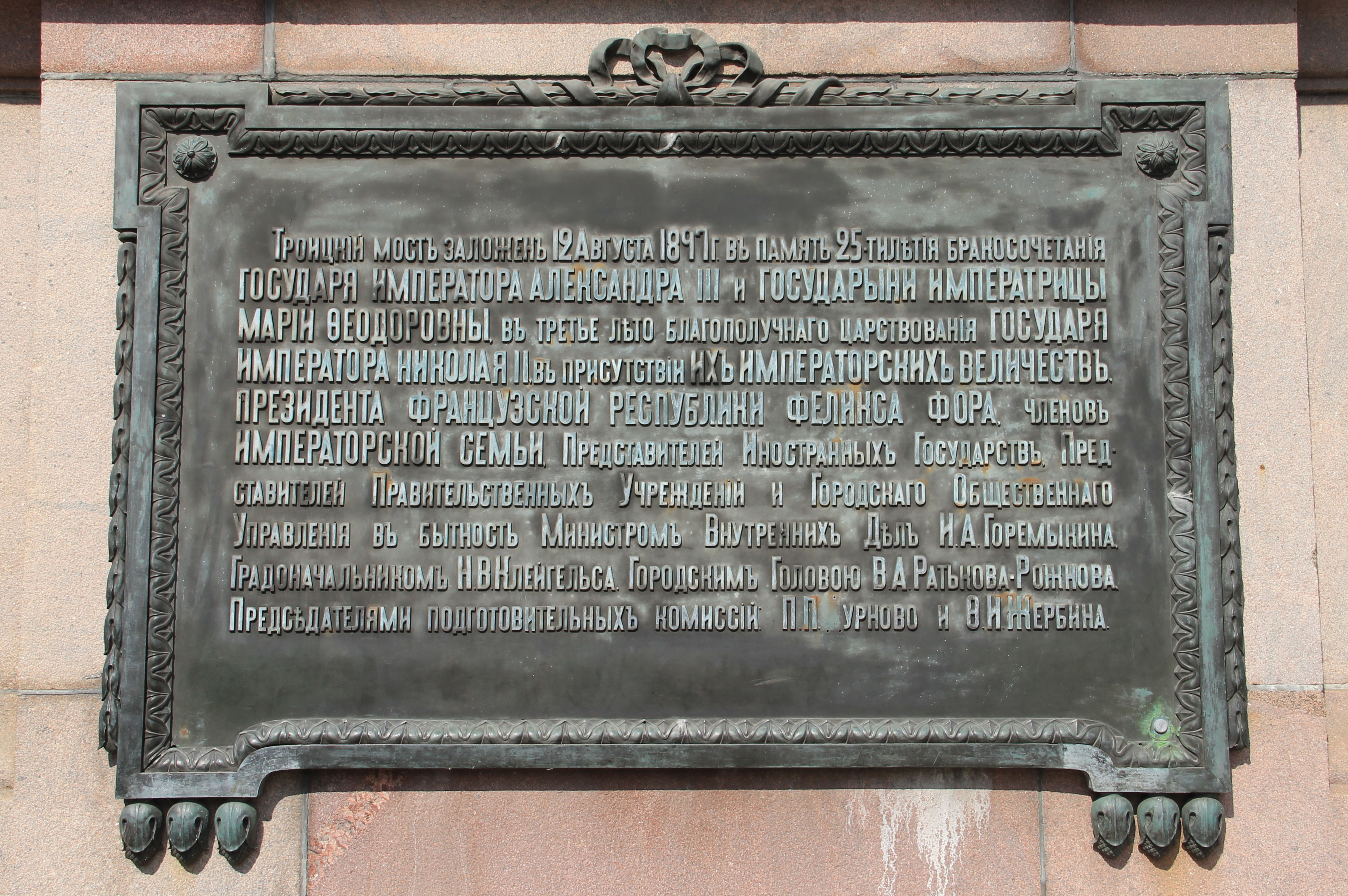 Мемориальная доска на левобережном устое моста с низовой стороны. Троицкий мост через Неву, Санкт-Петербург